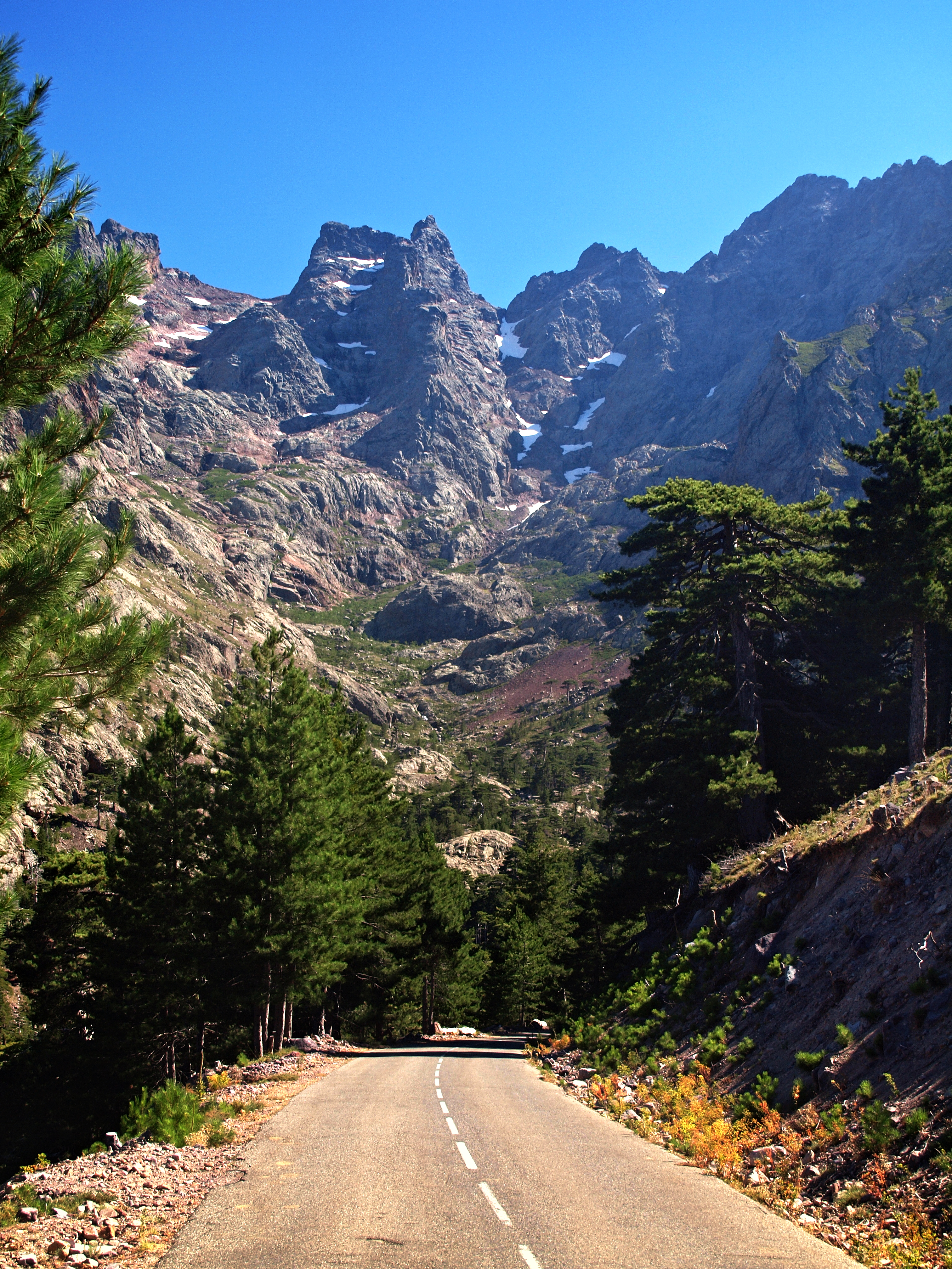 Asco (Corsica) - Capu Larghia, Capu Rossu, Punta Minuta depuis la route D147